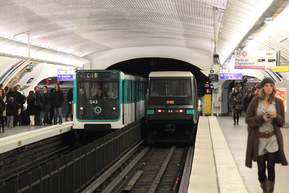 Un vénérable MP59 croise un MP89 dans la station Odéon, sur la ligne 4 du métro parisien.